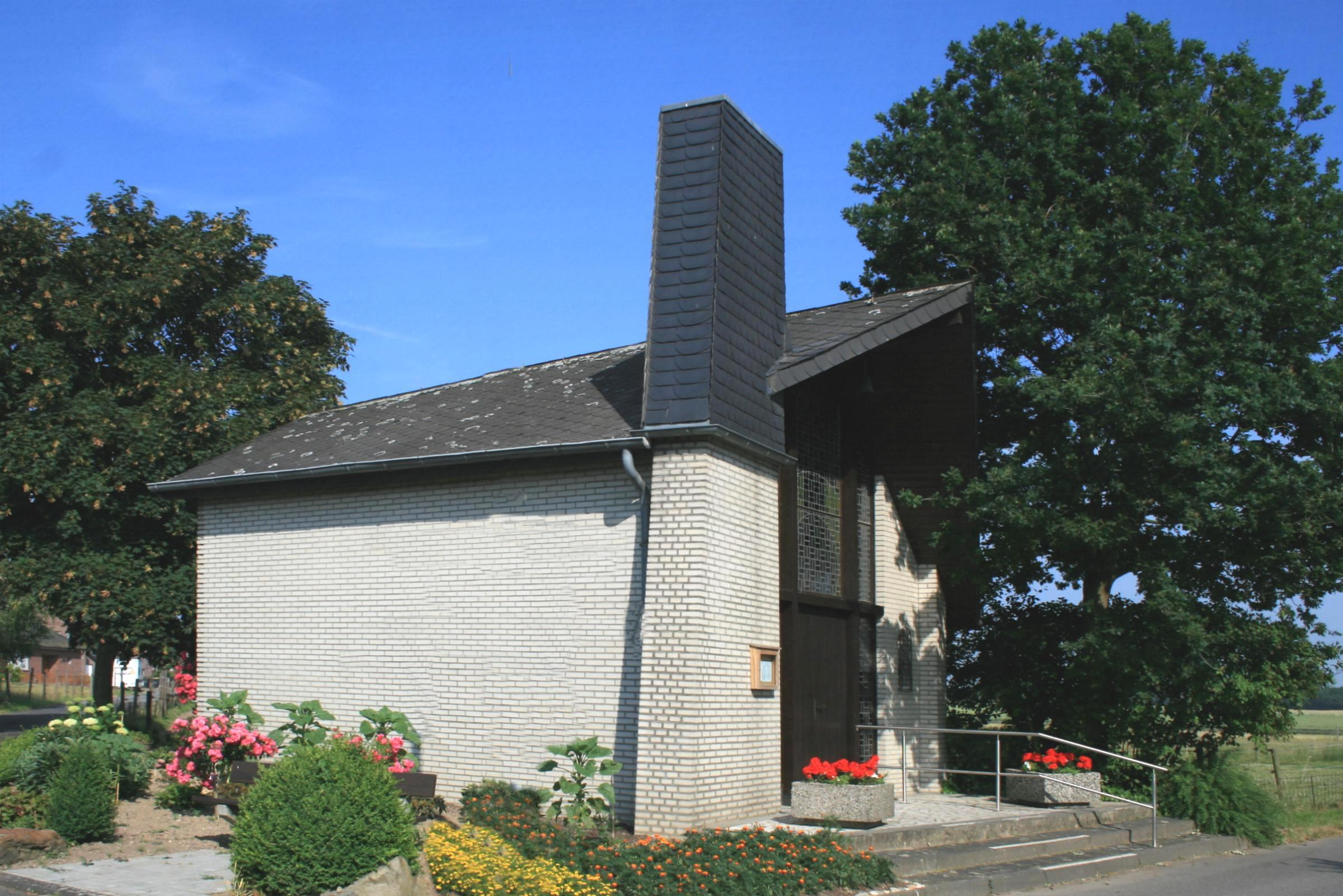 Kirchen, Kapellen in Wegberg